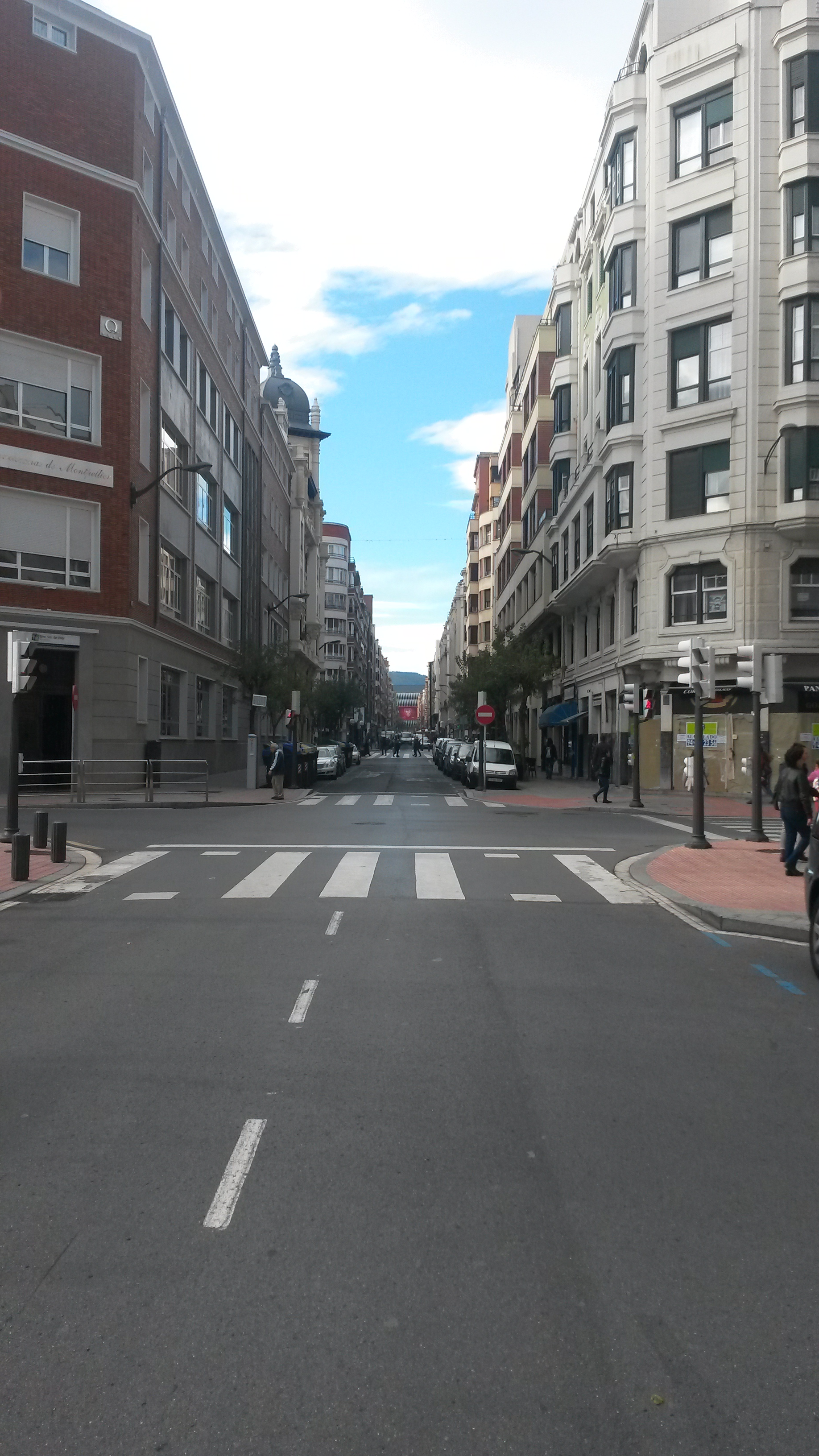 Calle Licenciado Poza a la altura de la Plaza Bizkaia. Al final de la misma el nuevo Estadio de San Mamés.